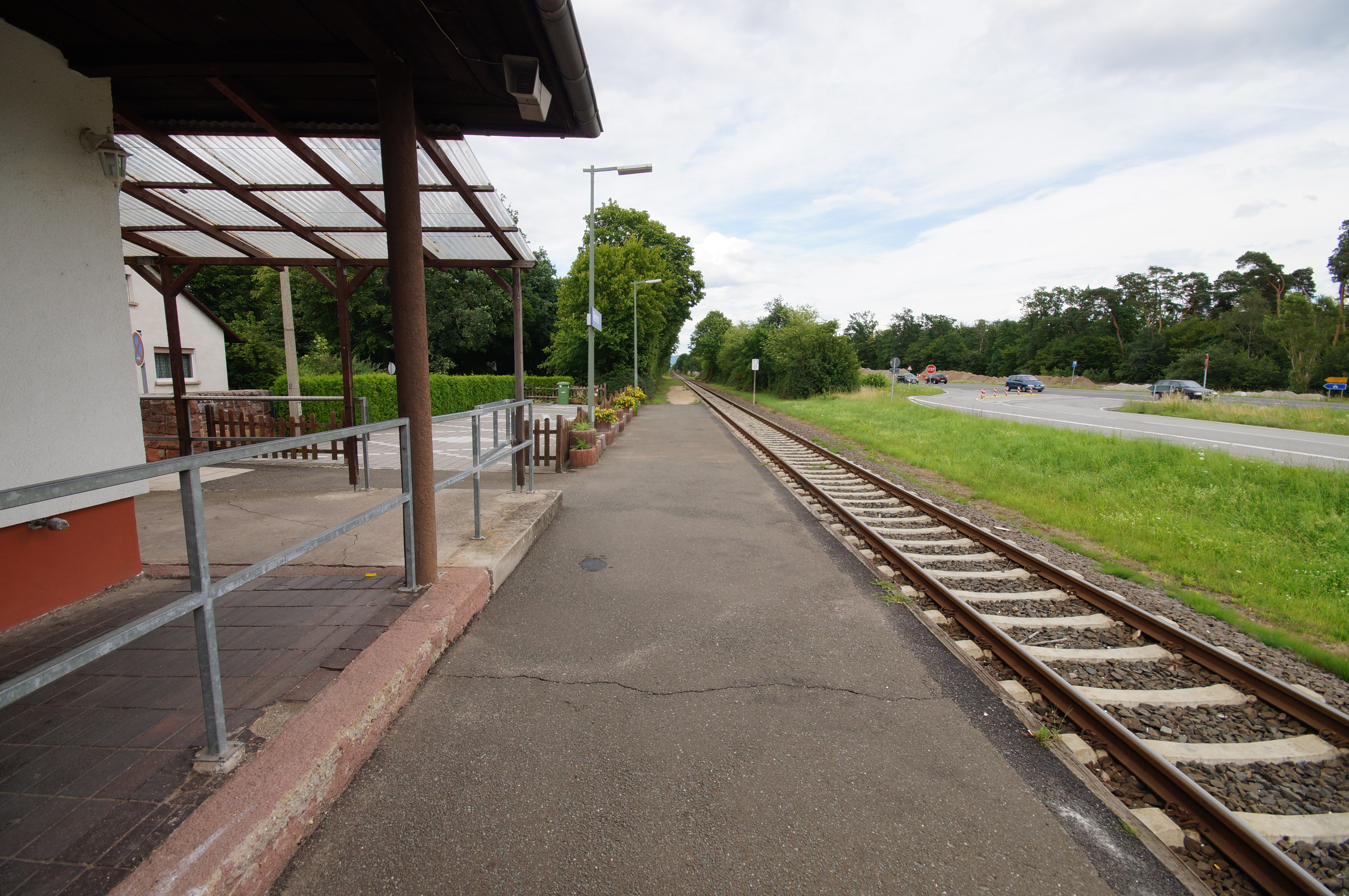 Bahnsteig des Haltepunkts Riedrode in Bürstadt-Riedrode